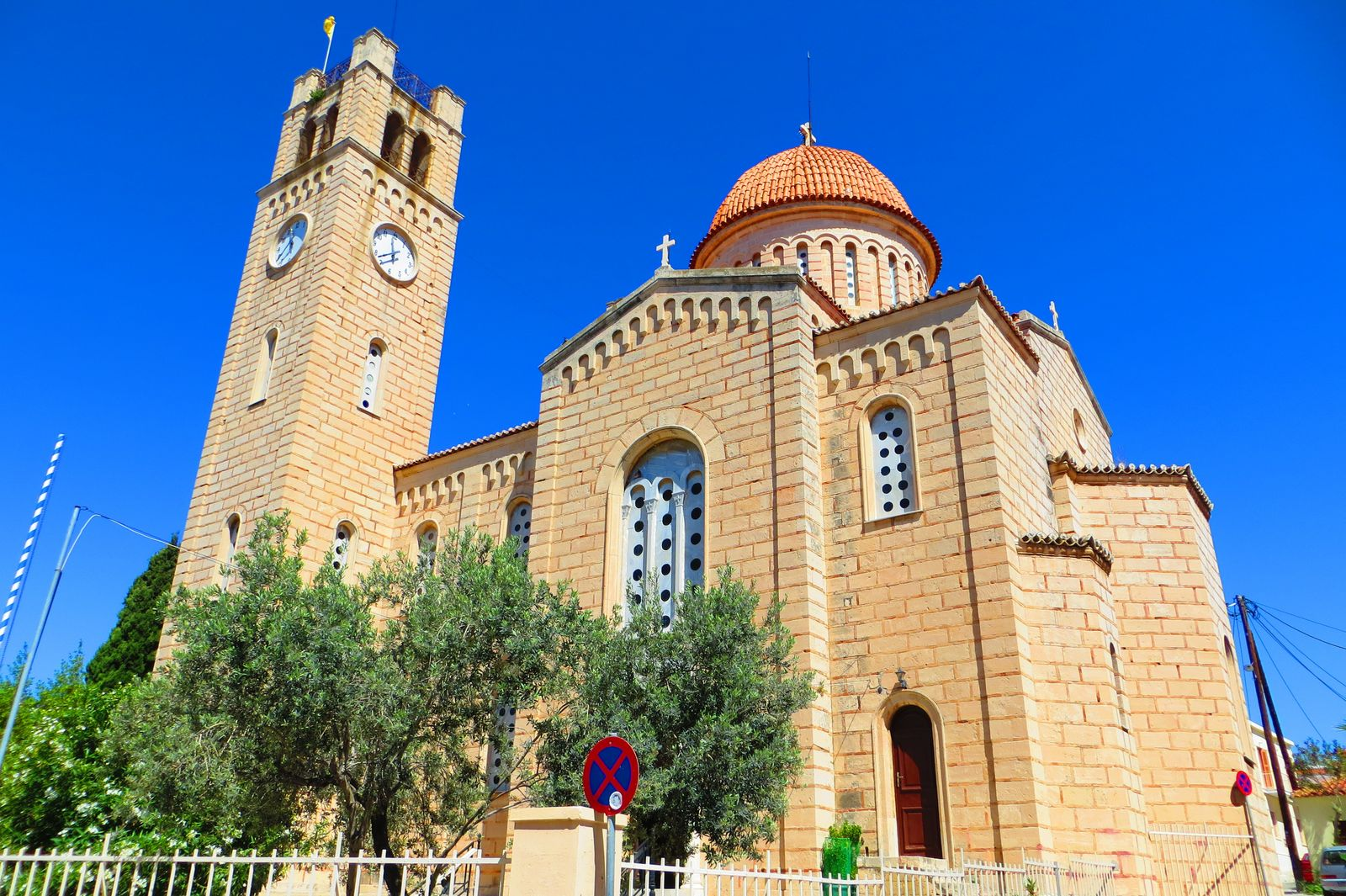 "Eisodia tis Theotokou" church